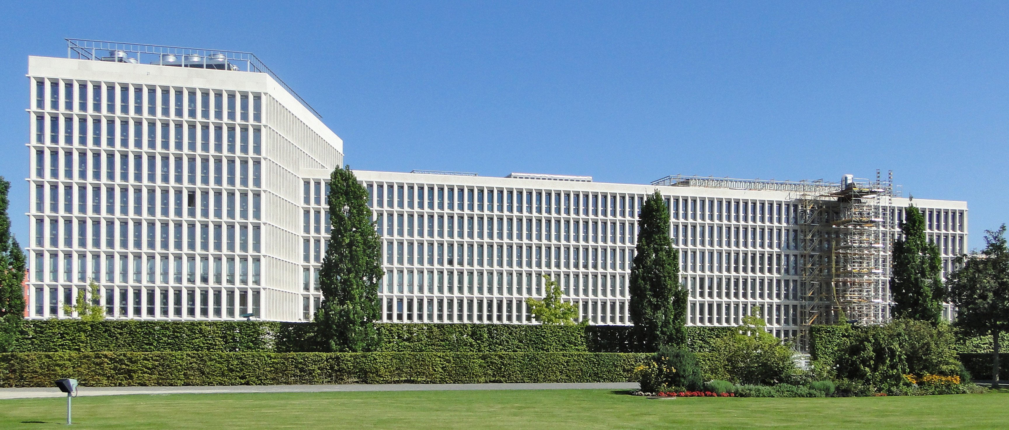 Neubau des Bundesministerium des Innern in Berlin am 24.8.2013 aufgenommen vom Park des Kanzlersamts.